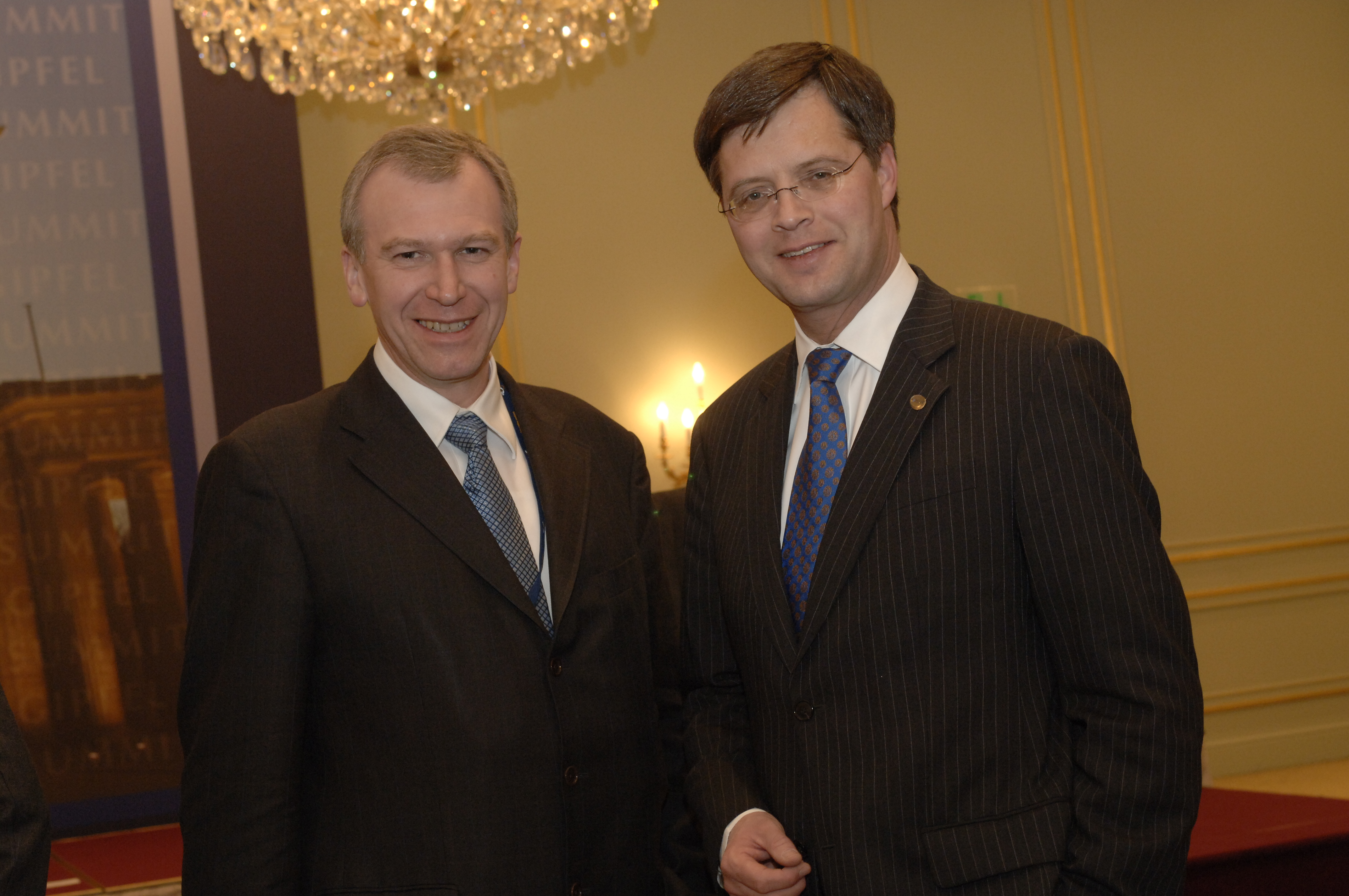 EPP Summit 24 March 2007